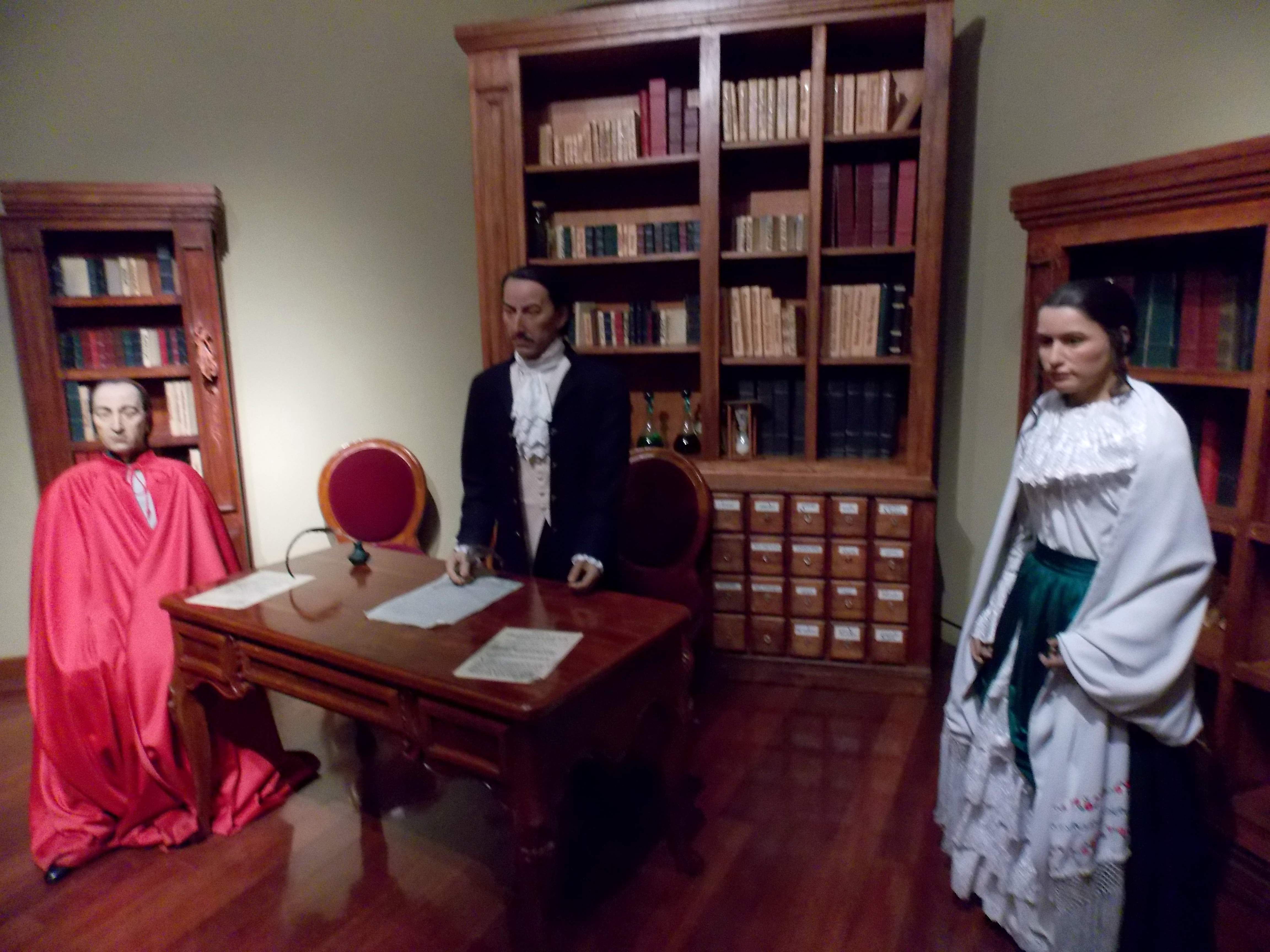 Figuras en cera de los próceres quiteños Eugenio y Manuela Espejo, parte de la colección del Museo Alberto Mena Caamaño, en el centro histórico de la ciudad de Quito (Ecuador).